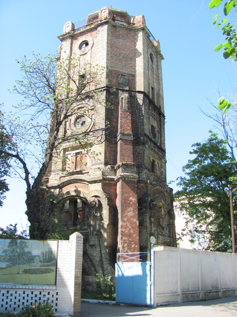 Казатин, водонапорная башня (арх. Кобелев). Построена ок. 1888-1890 г.г.